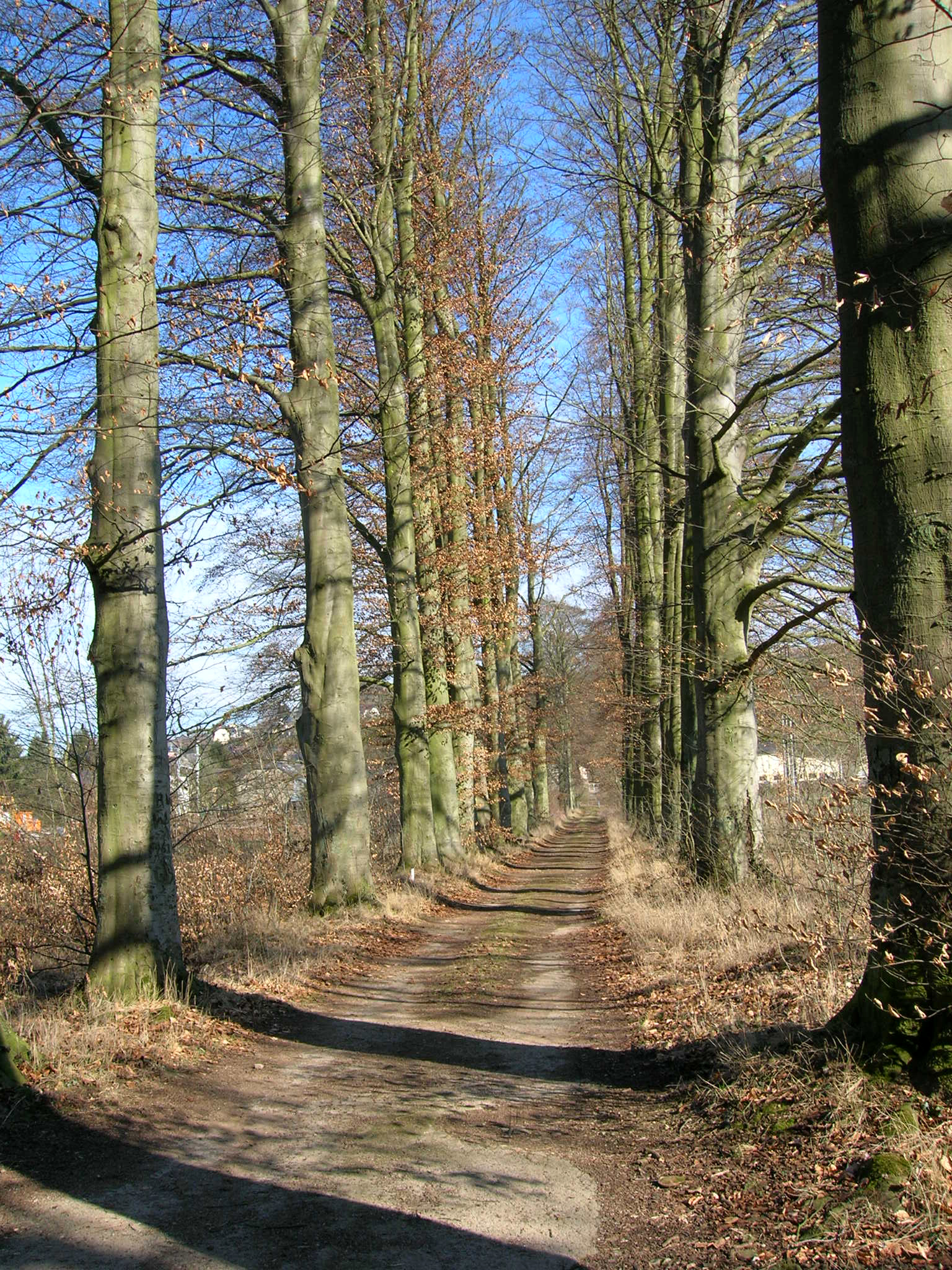 Allee bei Biertreng.